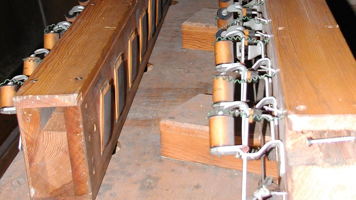 Teile einer elektropneumatischen Traktur (Orgel)